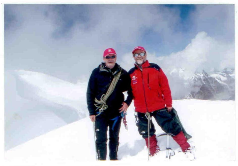 Maciej Berbeka i Józef Hojda on Mera Peak